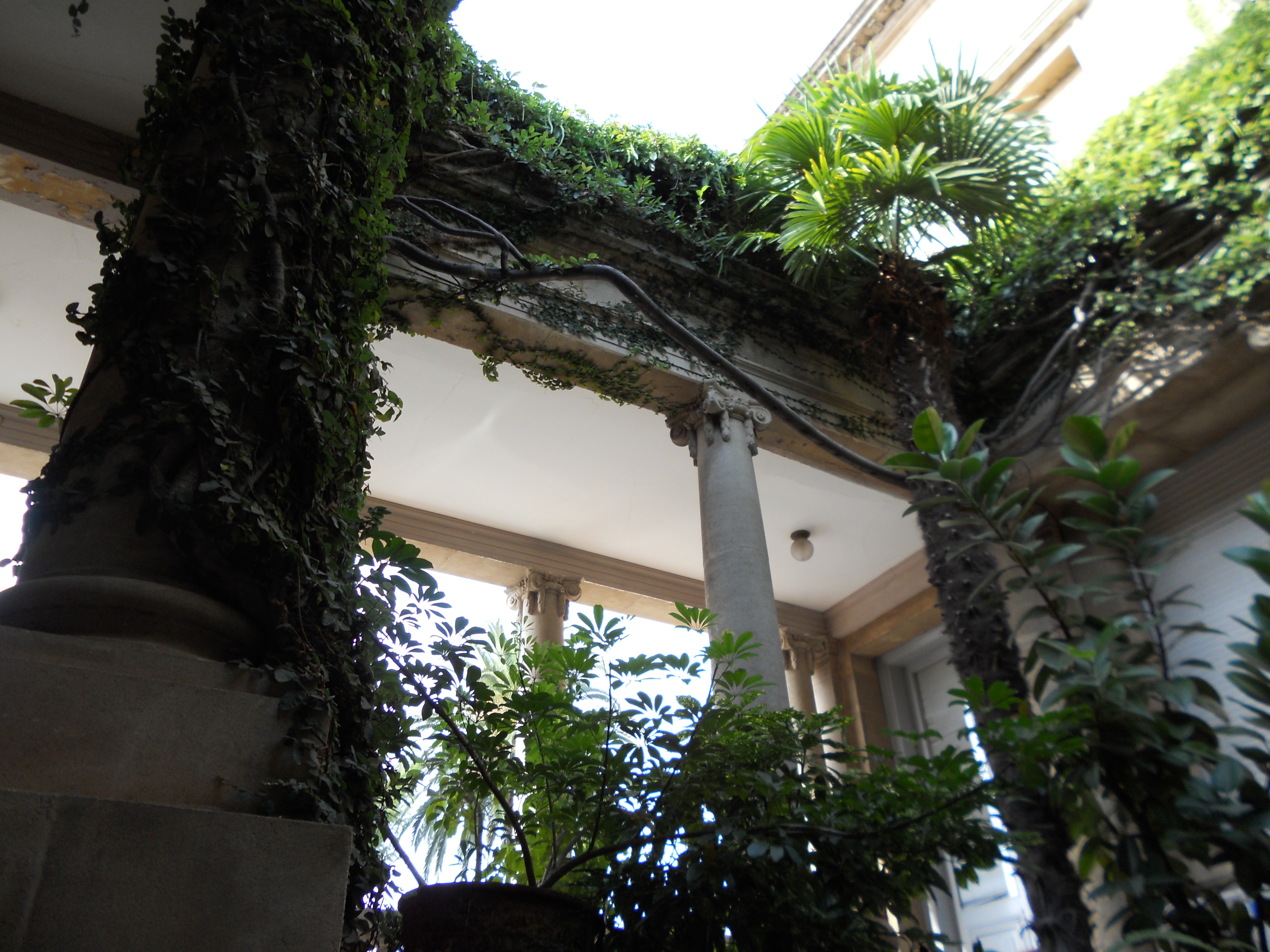 Detall de les columnes i el jardí del pati interior de la Casa de la Vila de Palafrugell, al Baix Empordà.